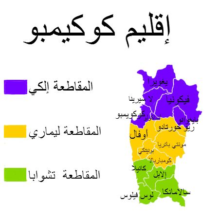 المنطقة الرابعة من كوكيمبو هي واحدة من المناطق الخمس عشرة التي تنقسم إداريا السياسية وشيلي.